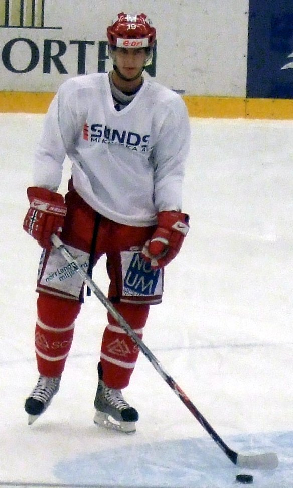 Ice hockey player Björn Svensson of Timrå IK in E.ON Arena, Timrå, Sweden